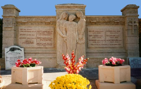 Monument aux morts de la guerre de 17-18, à Laire dans le Doubs, sculpture en pierre par Enrico Campagnola.